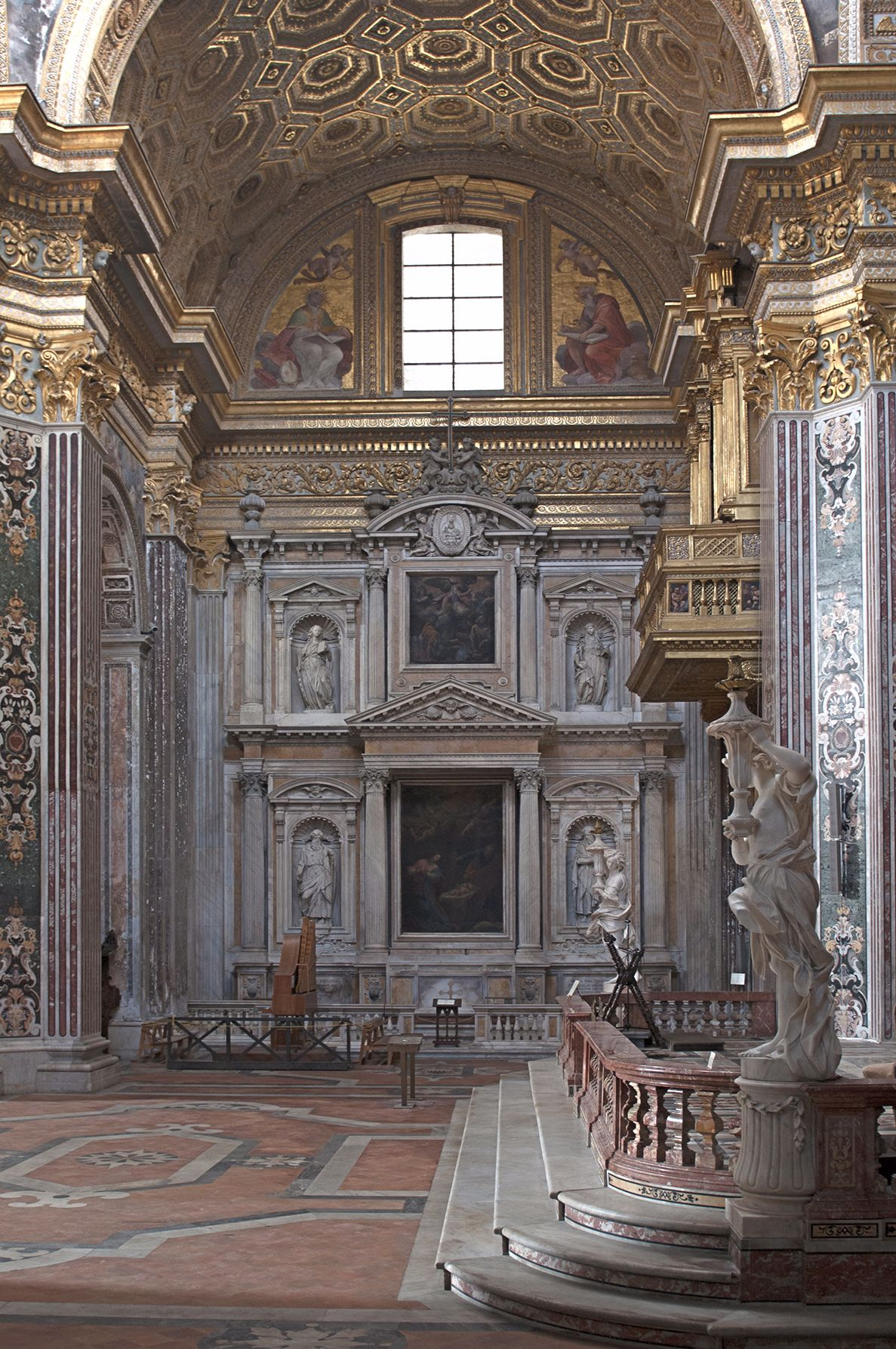 Interno Girolamini